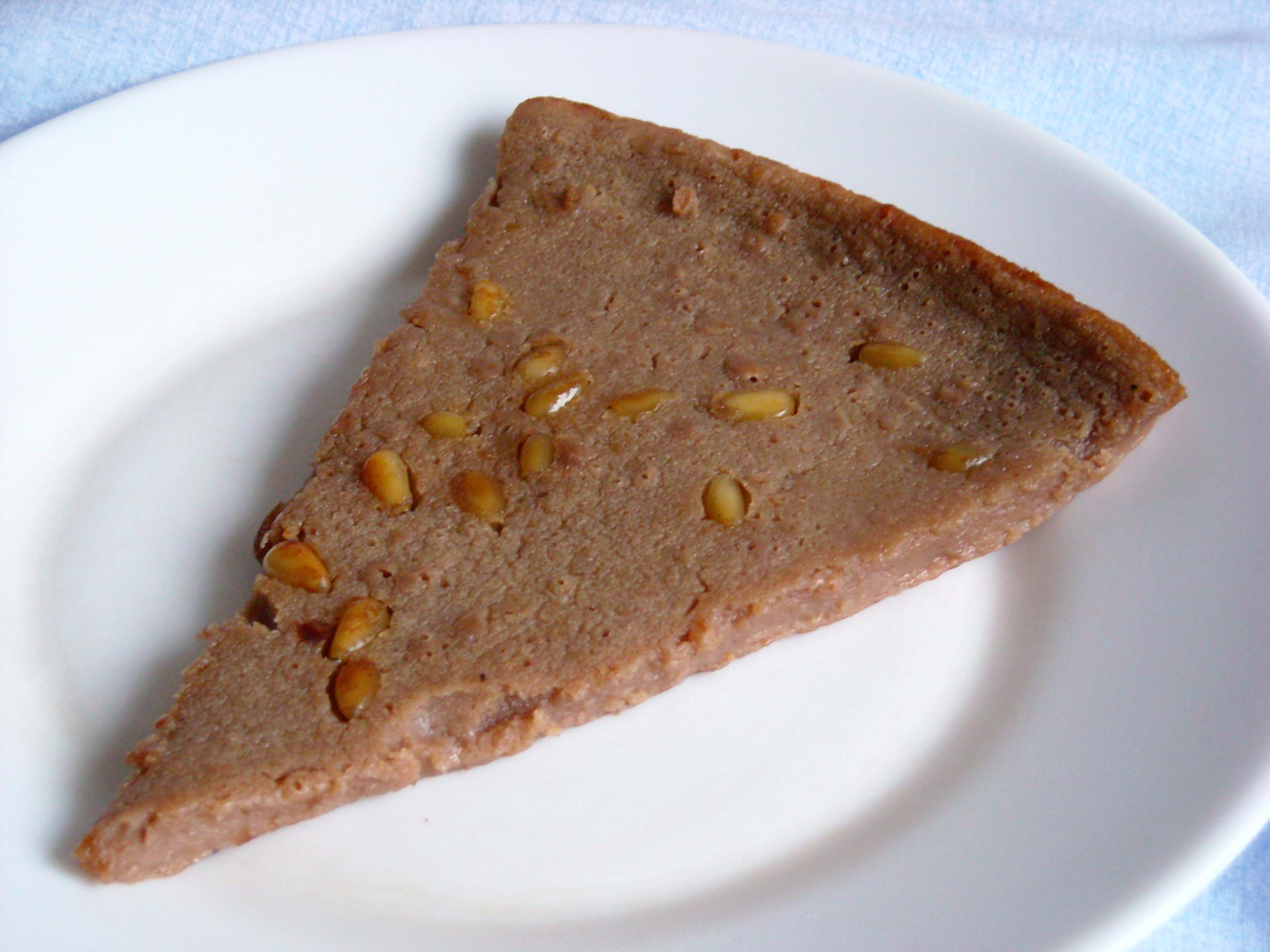 Castagnaccio fatto in Liguria.